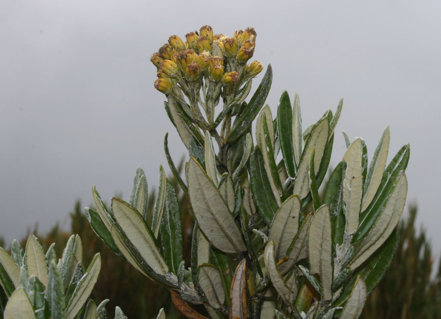 Monticalia andicola (= Senecio andicola, Pentacalia andicola), Asteraceae - Costa Rica: Prov. San José, Cordillera de Talamanca, Cerro Sákira E Carretera Interamericana, 3200-3300 m